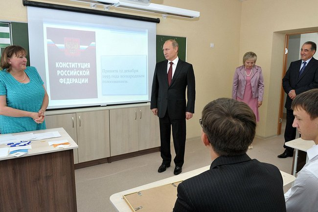 Владимир Путин в средней школе № 7, Курган. 2 сентября 2013 года.